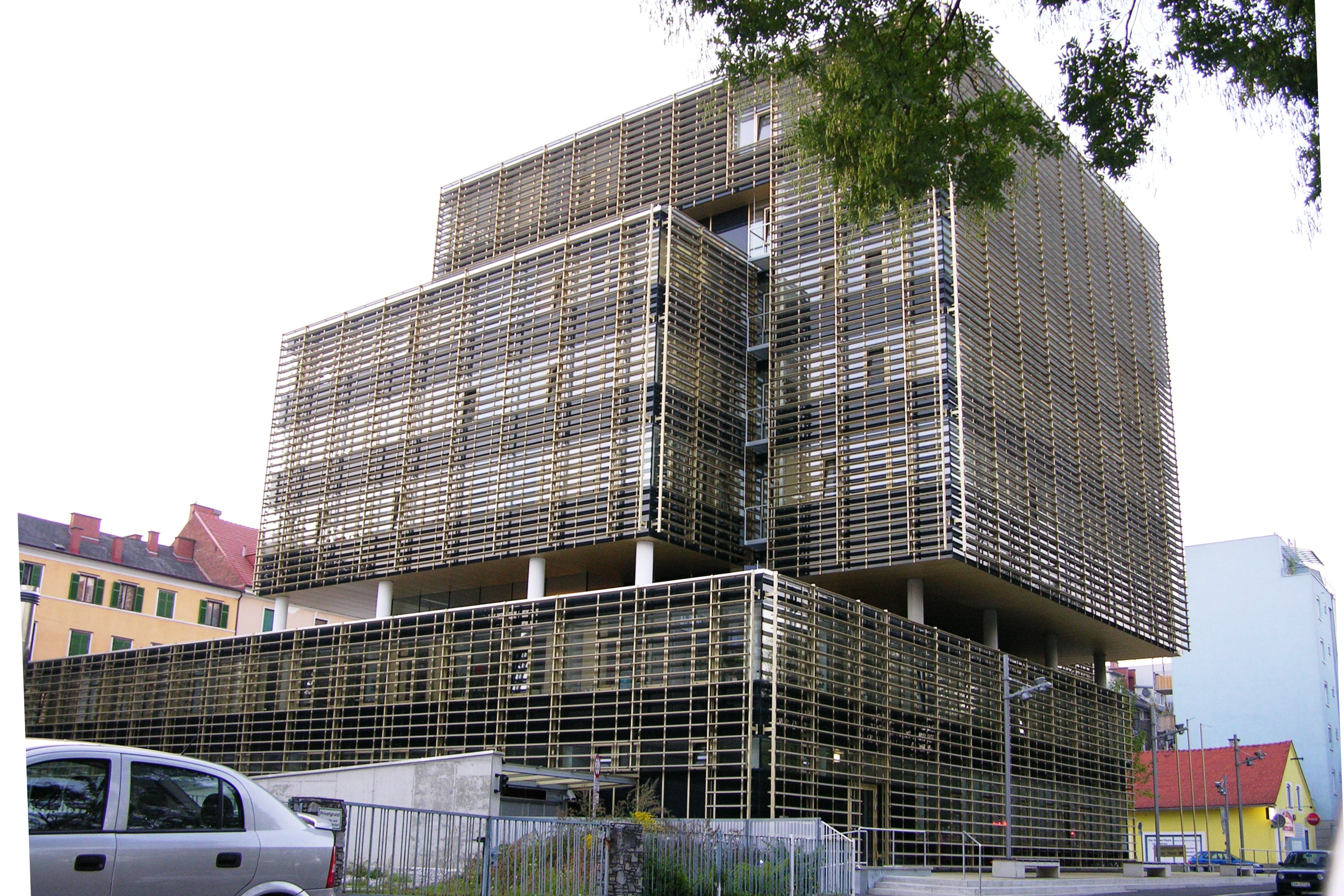 Neues Bezirksgericht in 8020 Graz (2007)